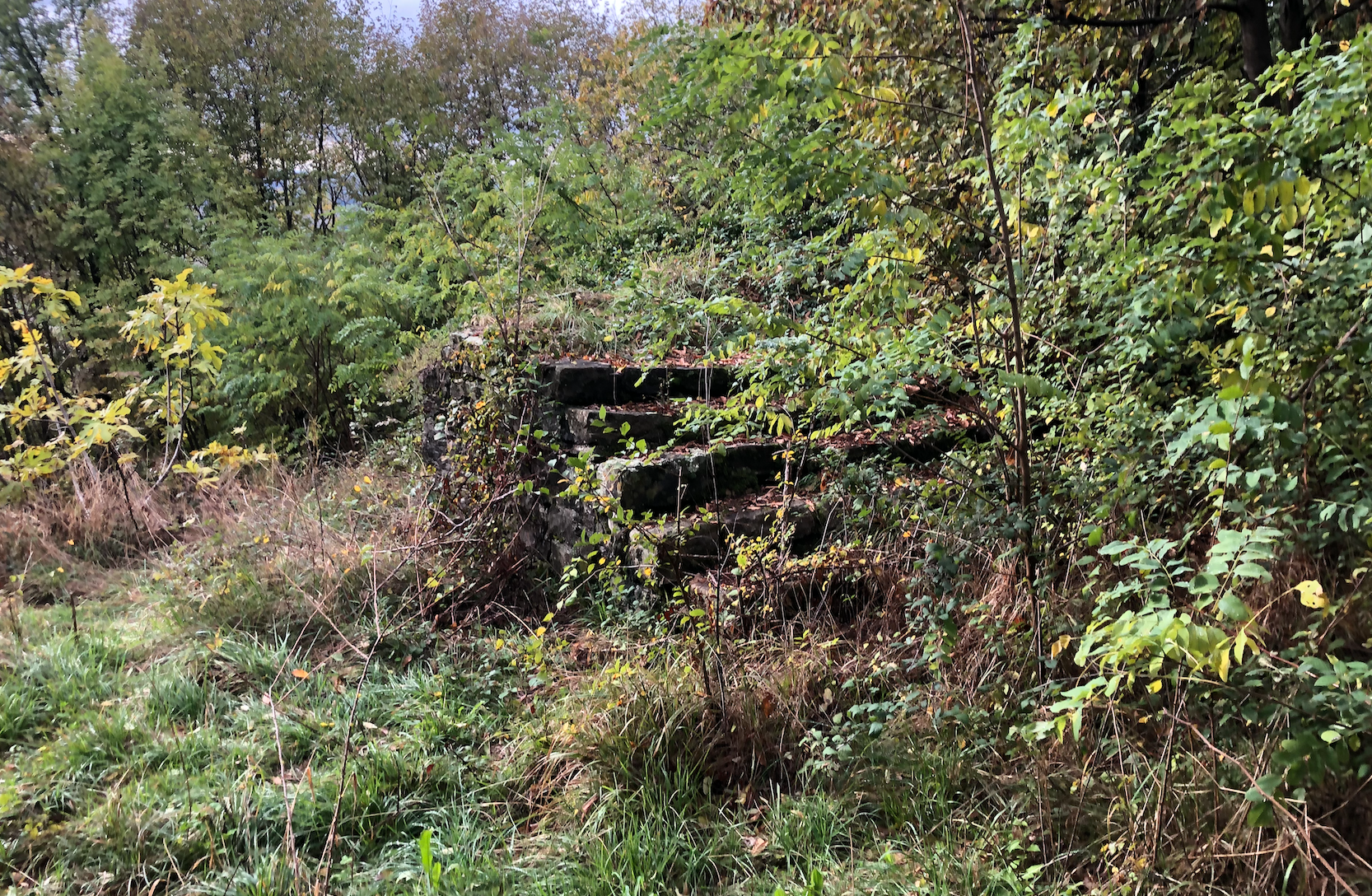 Castello di Soffumbergo - Scale